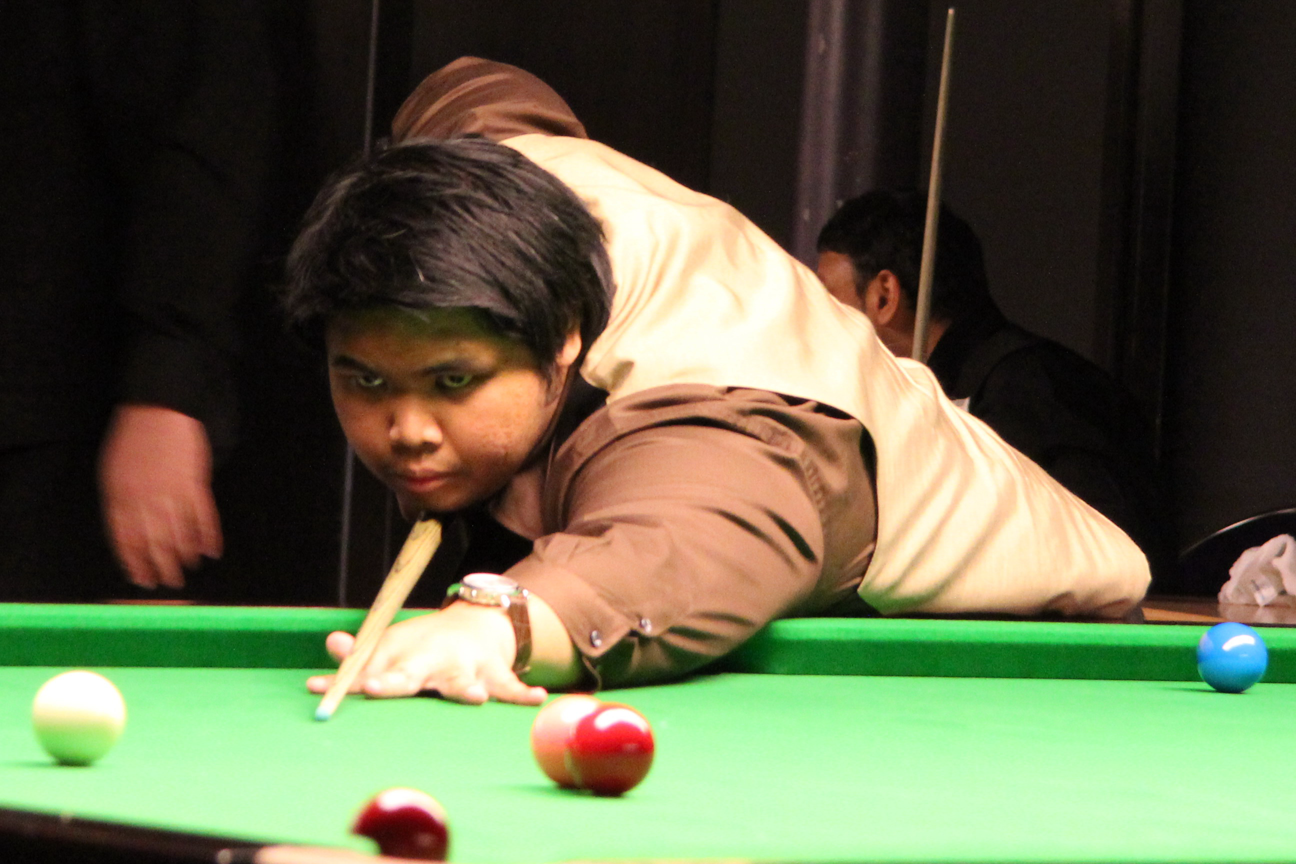 Passakorn Suwannawat beim Paul Hunter Classic 2011